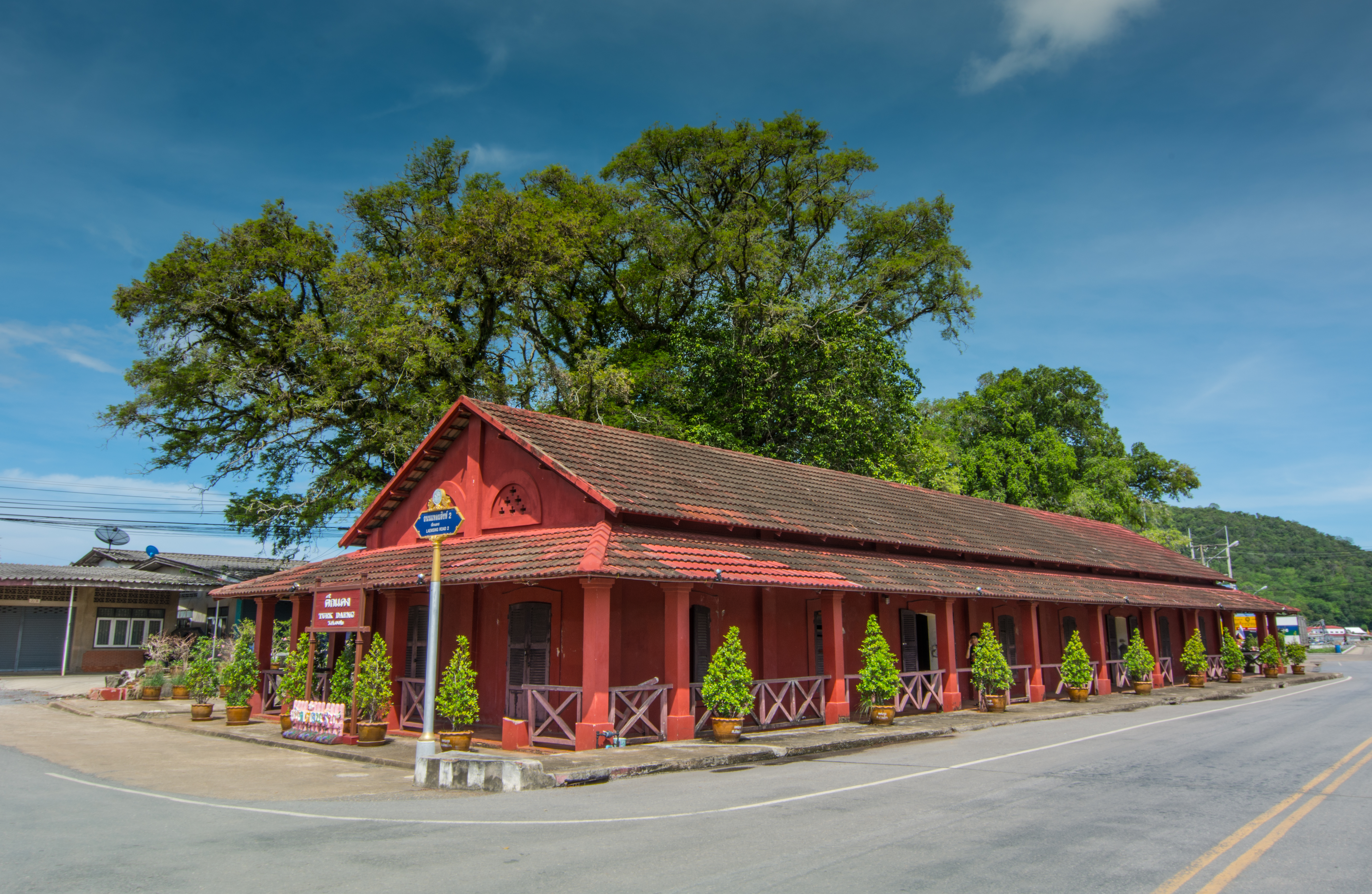 โบราณสถานตึกแดง